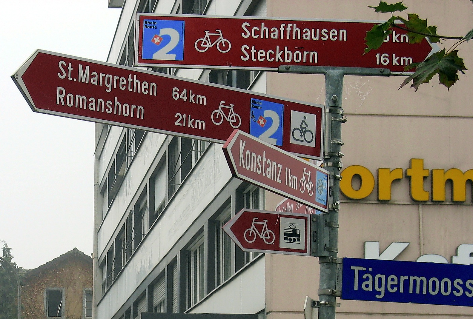 Veloweg2 Bodenseeradwegausschilderung in Kreuzlingen / Schweiz